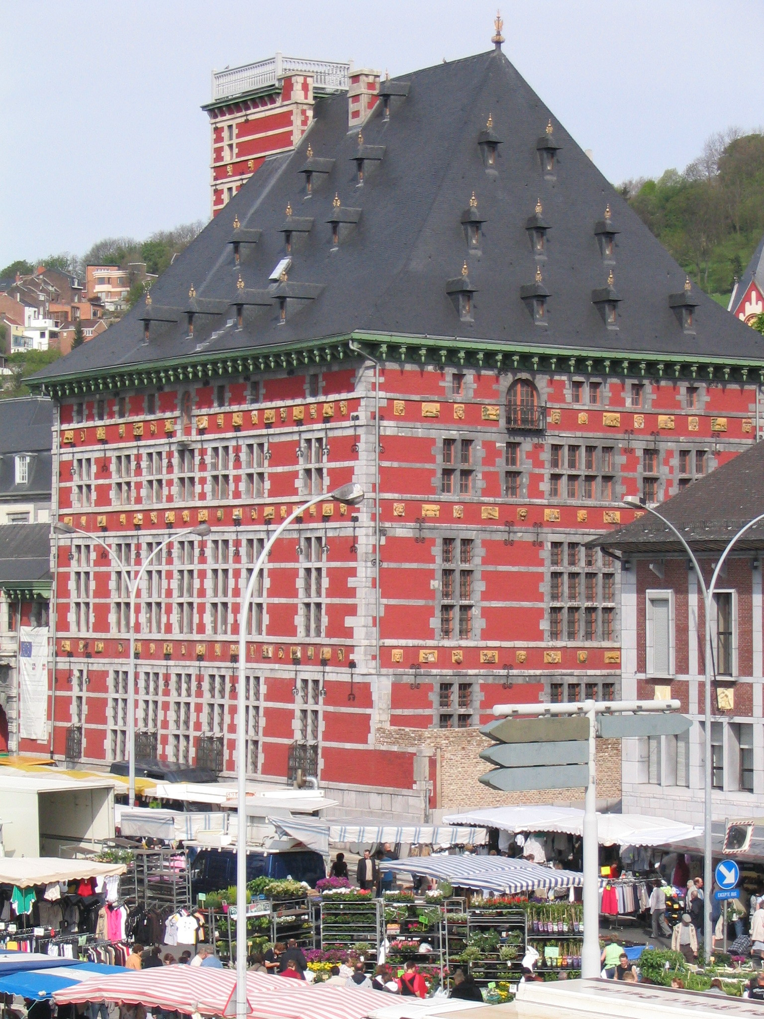 Maison Curtius à Liège un jour de marché hebdomadaire (Batte)